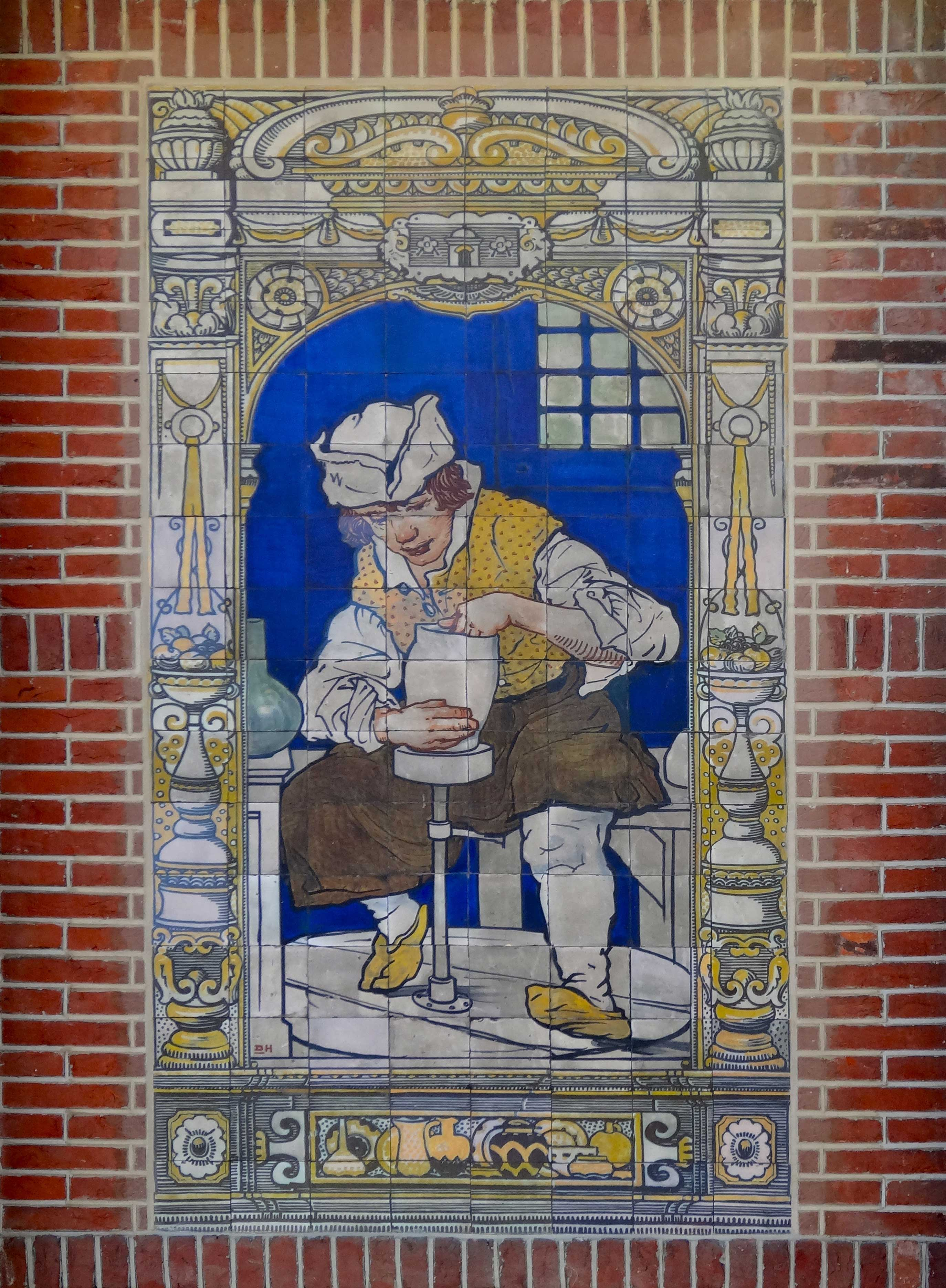 Tegeltableau van de voormalige plateelbakkerij Zuid-Holland (Plazuid) gemaakt waarschijnlijk in 1918 door Daniël Harkink. Het tableau met de afbeelding van een pottenbakker, is een van de twee tegeltableaus die oorspronkelijk in de plateelbakkerij hingen. Na de restauratie van het pand en de tegeltableaus, zijn zij na plaatsing op de gevel van de voormalige bakkerij in februari 2013, weer te bewonderen.